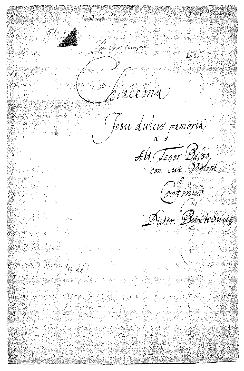 Dietrich Buxtehude, autographes Titelblatt der Kantate Jesu dulcis memoria (BuxWV 57)